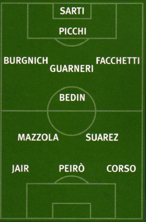 F.C. Internazionale Milano squad 1964-1965